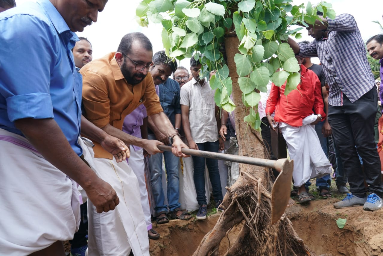 നിയമസഭ സ്പീക്കര്‍ ശ്രീ ശ്രീരാമകൃഷ്ണന്‍ അവര്‍കള്‍ അരയാല്‍ മരം നട്ട് കൊണ്ട് പരിപാടി ഉദ്ഘാടനം ചെയ്തു. Peepal tree (Sacred fig) (ശാസ്ത്രീയ നാമം Ficus religiosa കുടുംബം Moraceae.